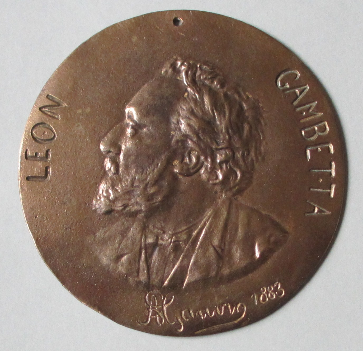 médaillon en bronze de 1883